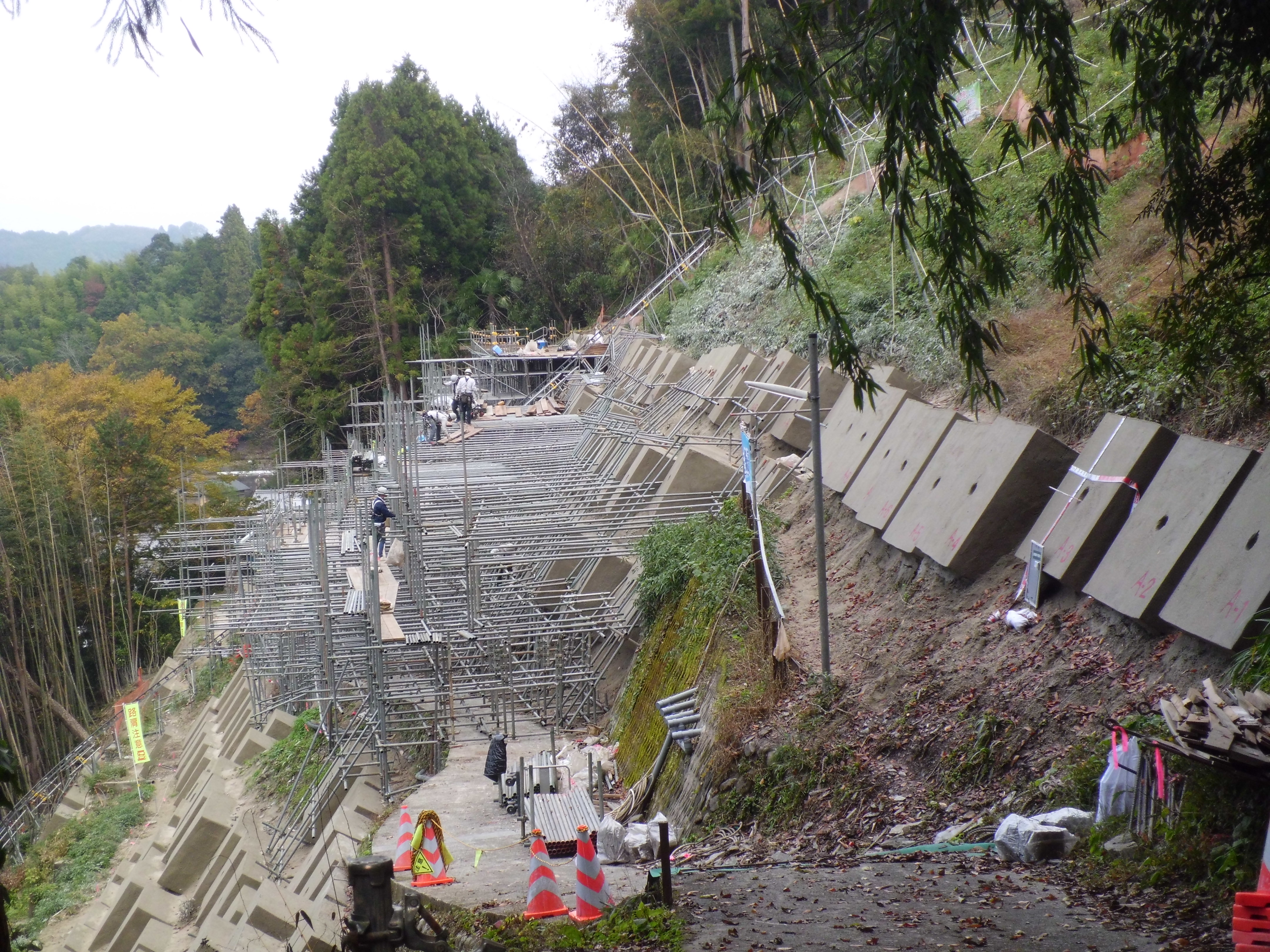 上古沢駅海側斜面